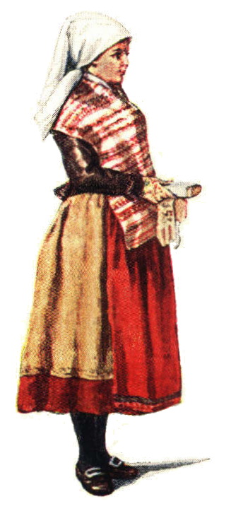 Folkdräkt från Norra Öland